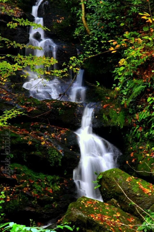 Sarıyayla Köyü Şelalesi